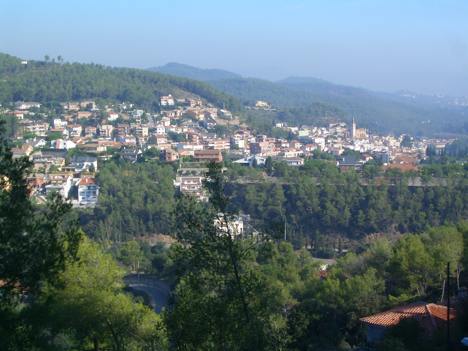 Picture of Torrelles de Llobregat, Catalonia, Europe